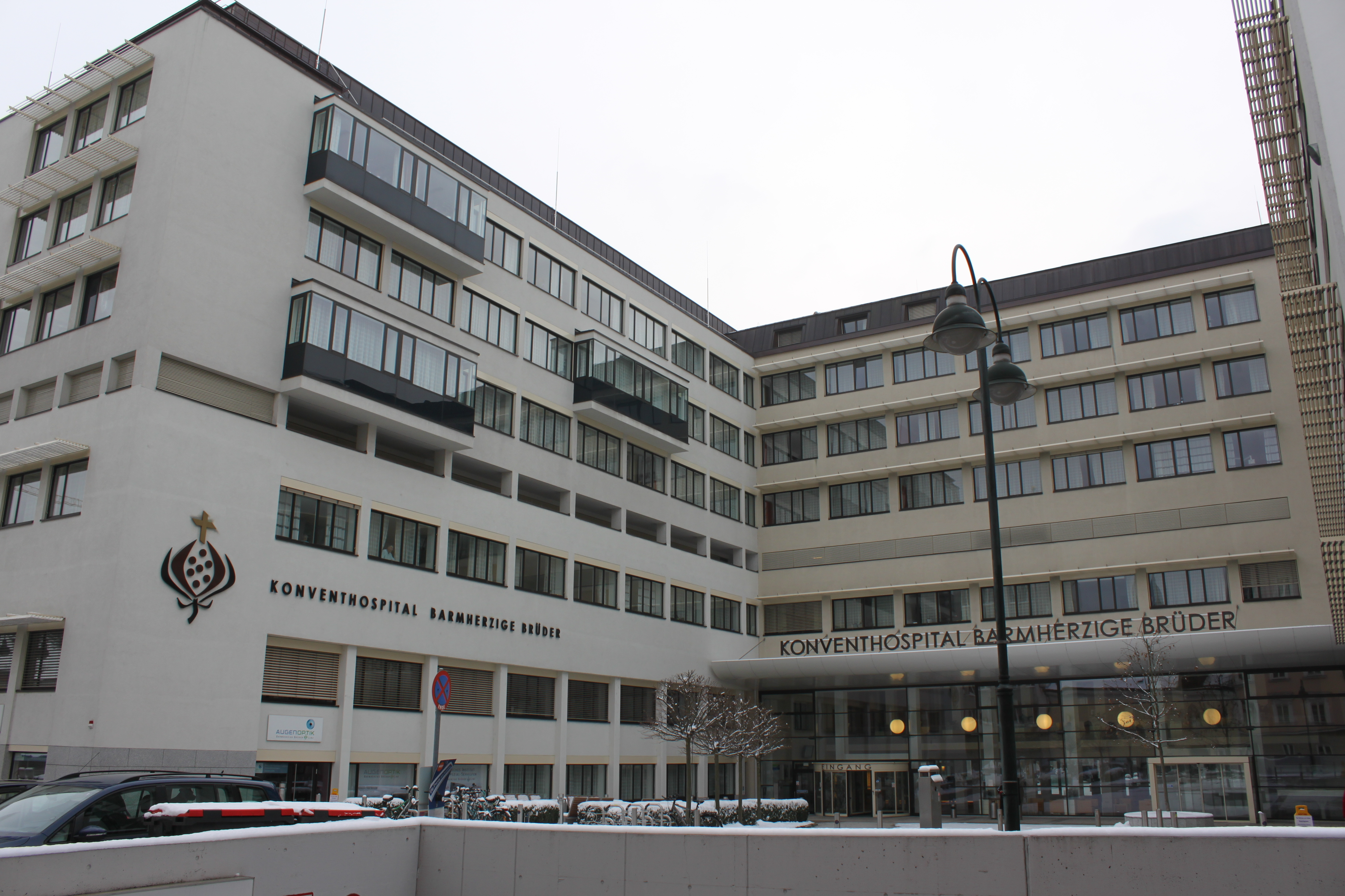 Konventhospital Barmherzige Brüder Linz, Hauptgebäude des Spitals an der Seilerstätte mit Hof und Eingangsbereich